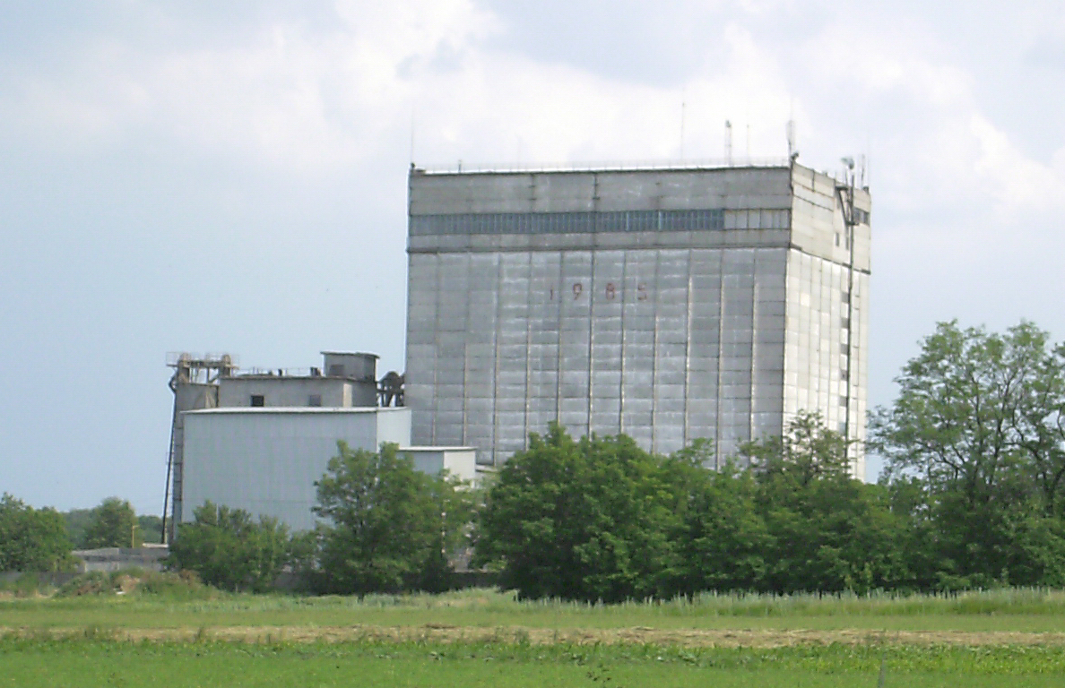 Комбікормовий завод поблизу селища Бересток: м. Костянтинівка